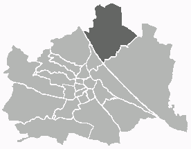 Positionskarte des 21. Wiener Gemeindebezirks Unter Verwendung einer Vorlage von Extrawurst. Public Domain.